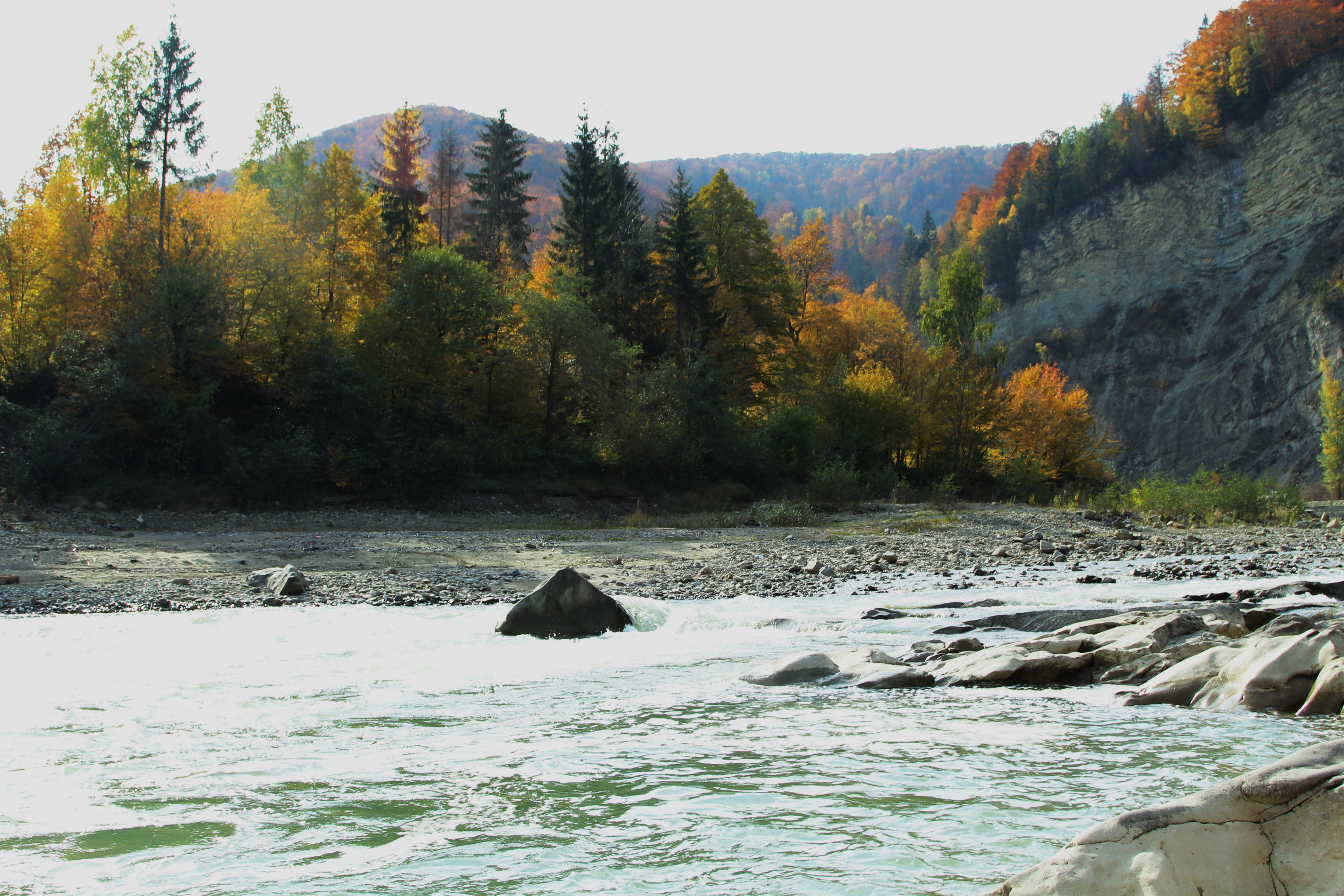 Черемоський, Вижницький район: ділянка р. Черемош з притоками від м. Вижниця вгору по течії в межах Чернівецької області